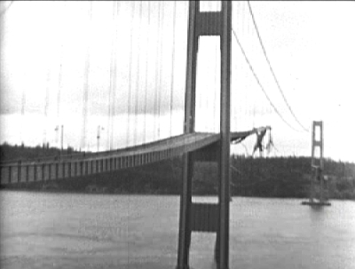 Die eingestürzte erste Tacoma-Narrows-Brücke. Bild aus dem Video von